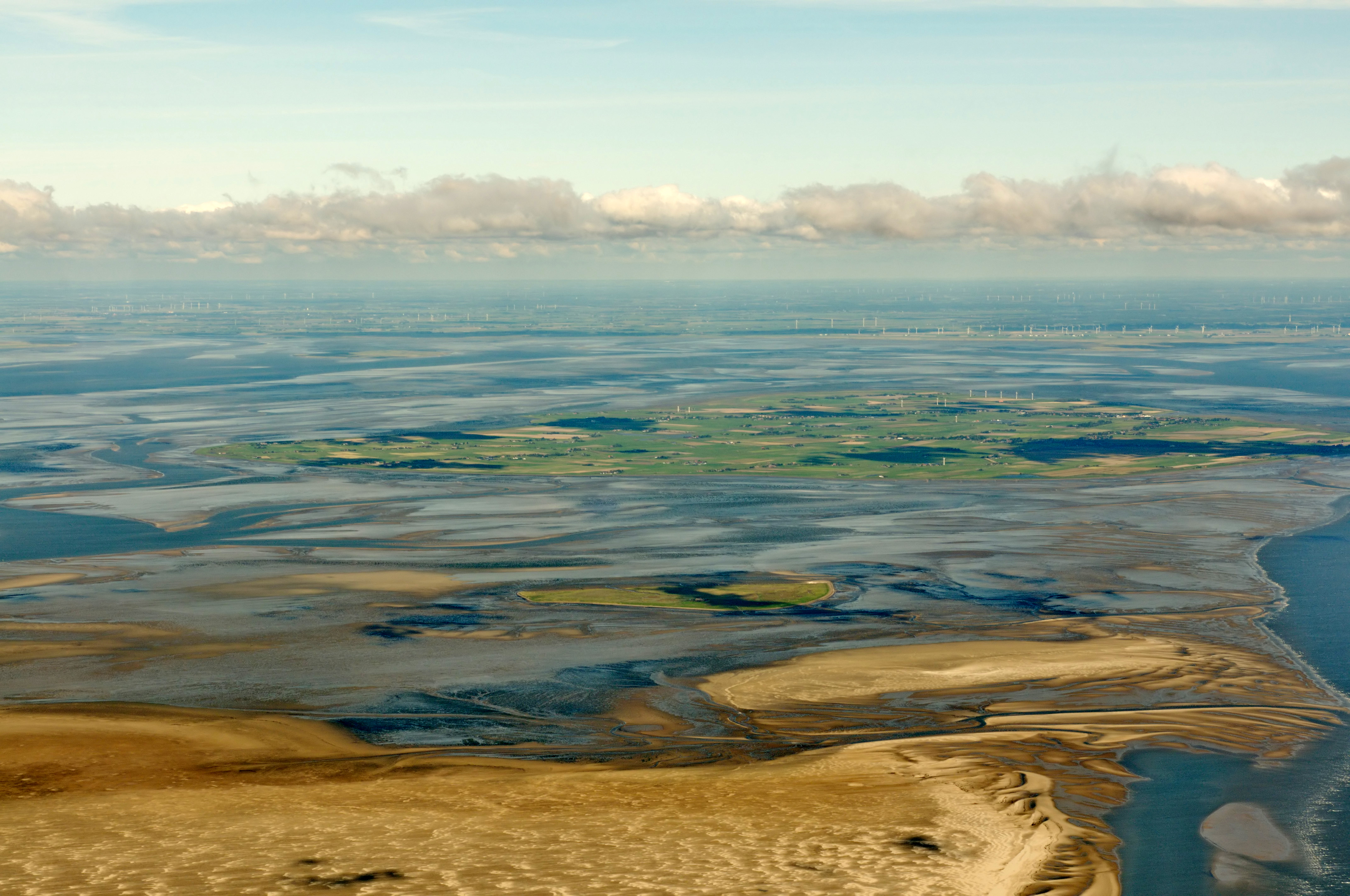 Fotoflug über das nordfriesische Wattenmeer - Pellworm (von SW), davor Süderoog, ganz vorne Süderoogsand